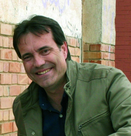 Imatge de Josep Ibarz i Gilart (París, 1961), polític català, alcalde d'Almacelles des de l'any 2003.